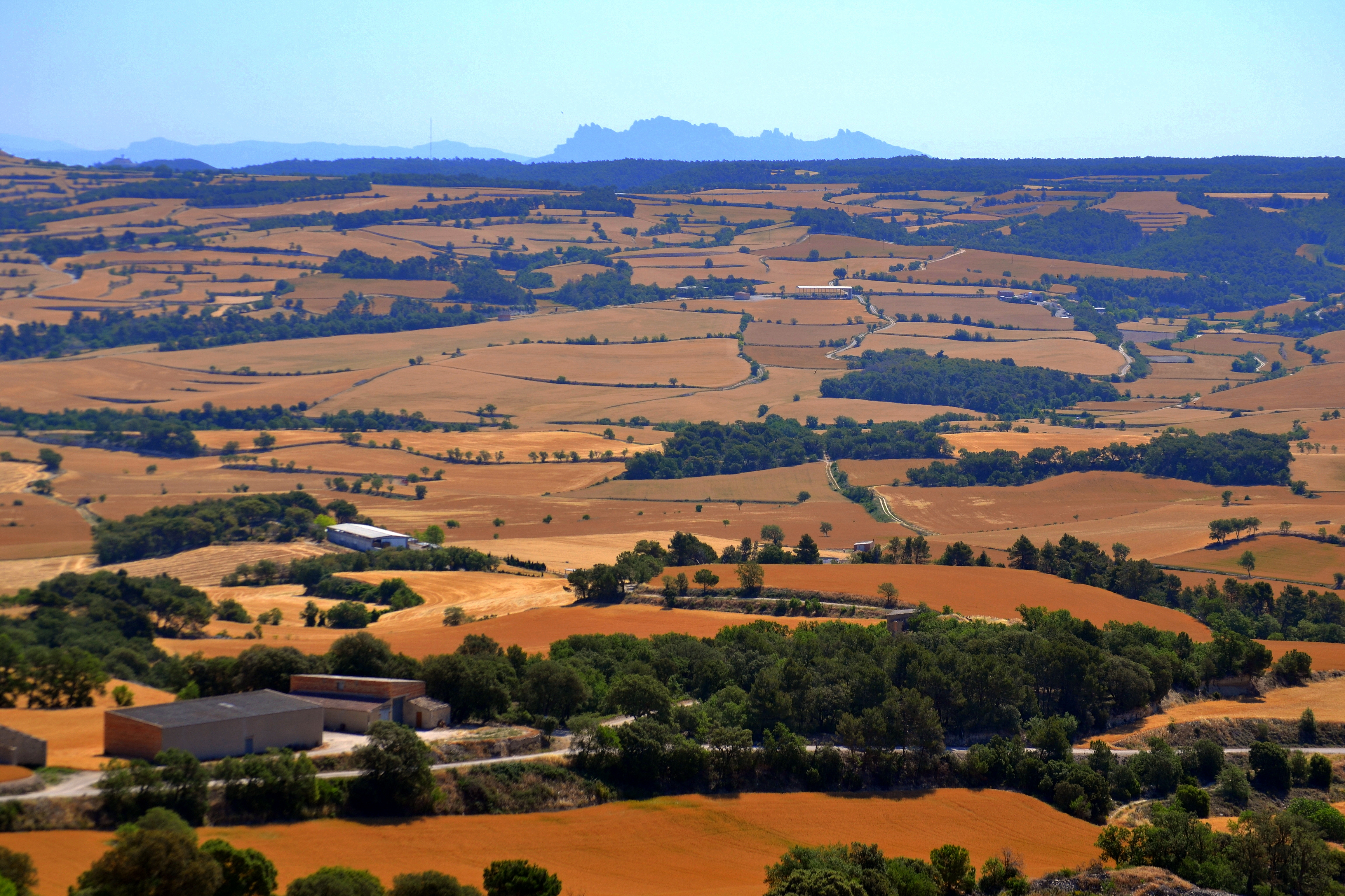 Granyena This is a a photo of a natural area in Catalonia, Spain, with id: ES510254